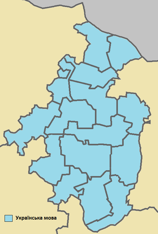 Рідна мова по сільських радах Білокуракинського району Луганської області України. Перепис 2001 року.